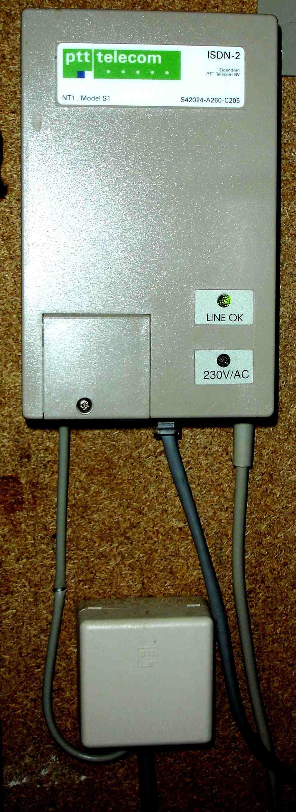 ISN infrastructure